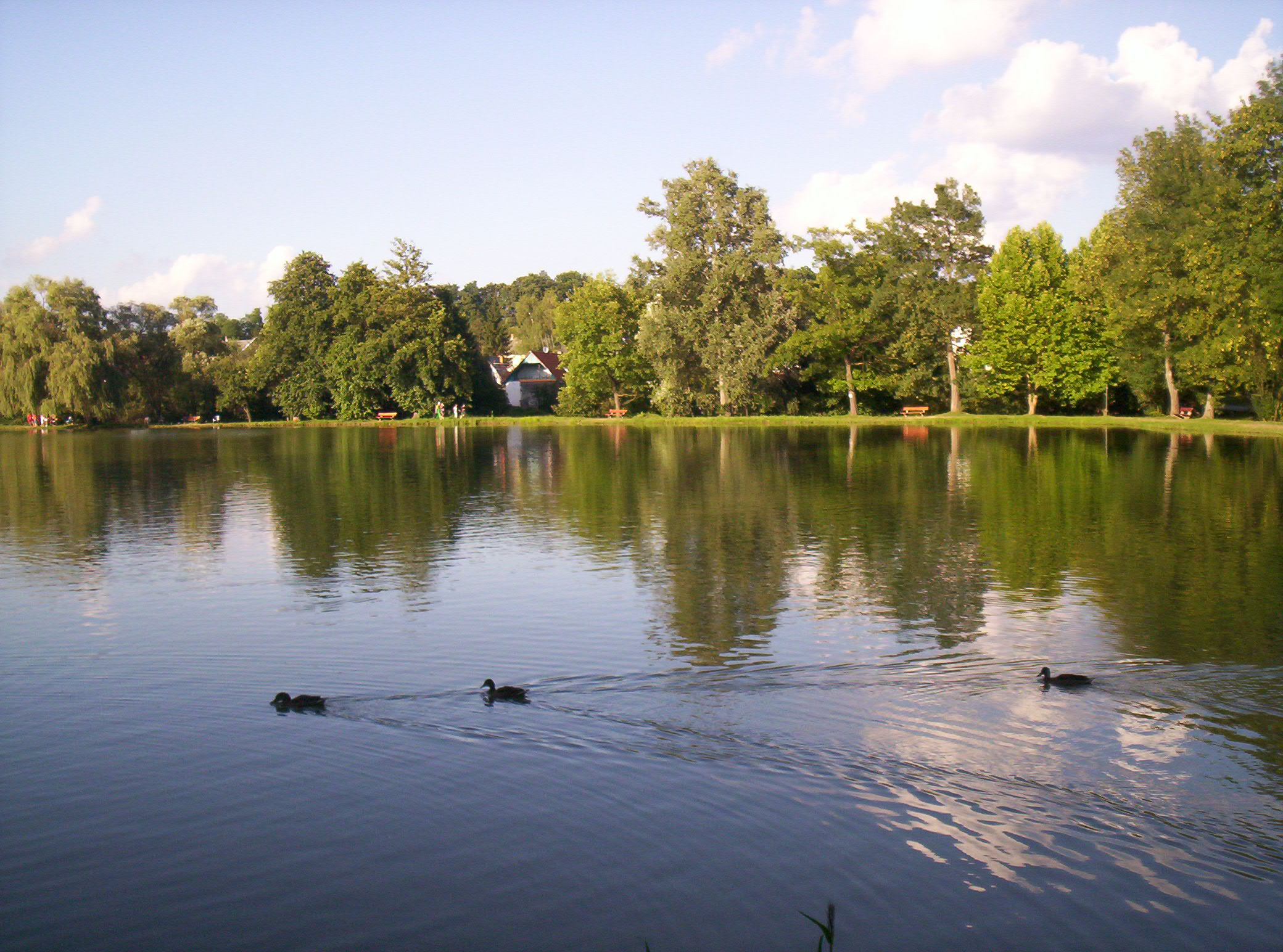 Mesterséges tó Abaligeten – photo taken by uploader User:Csanády in 2006.